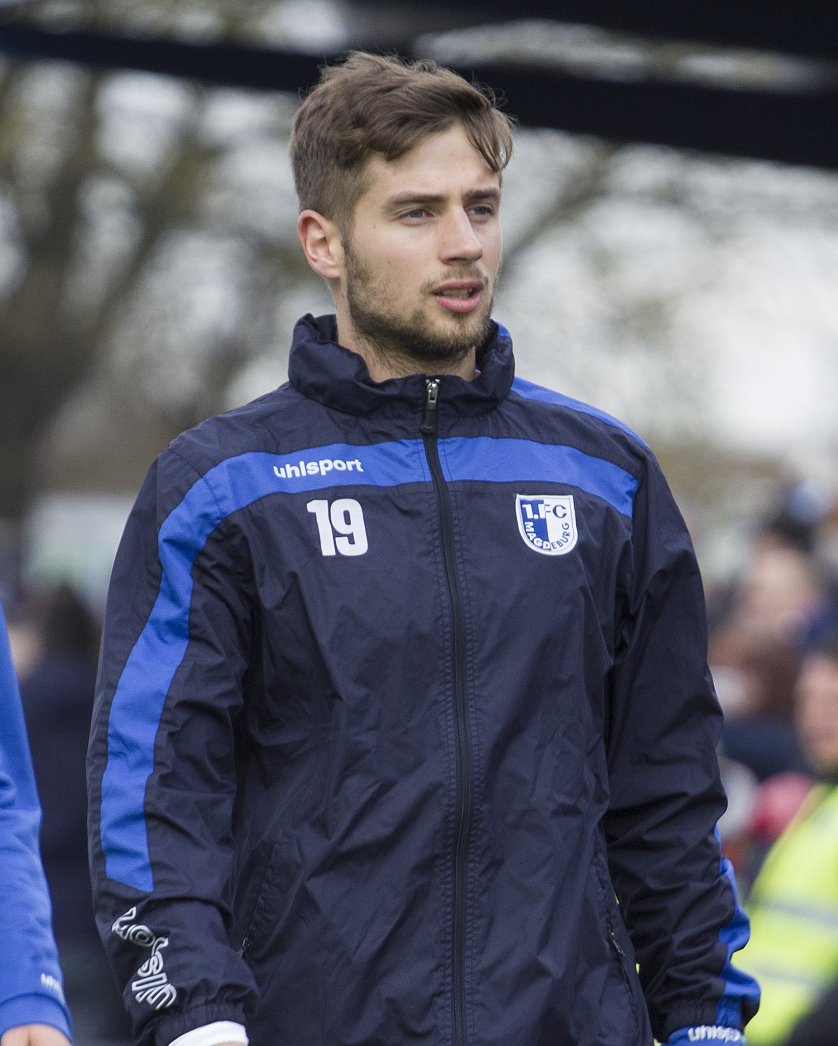 Michel Niemeyer